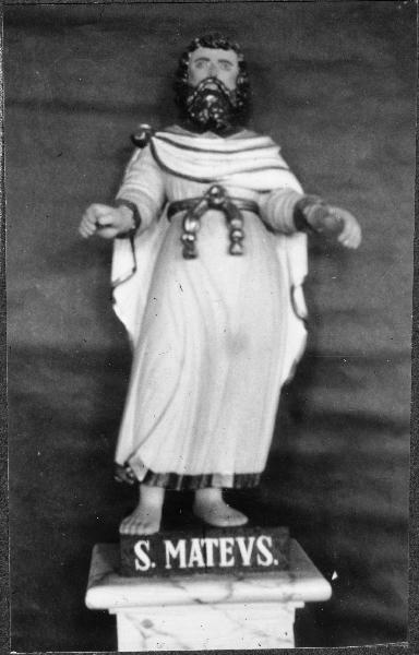 Träskulptur föreställande S:t Matteus. Kategori: (05) SkulpturerTräskulptur föreställande S:t Matteus.